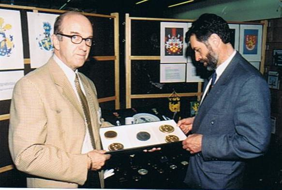 Juhani Toukonen ja puolustusminusteri Jan-Erik Enestam